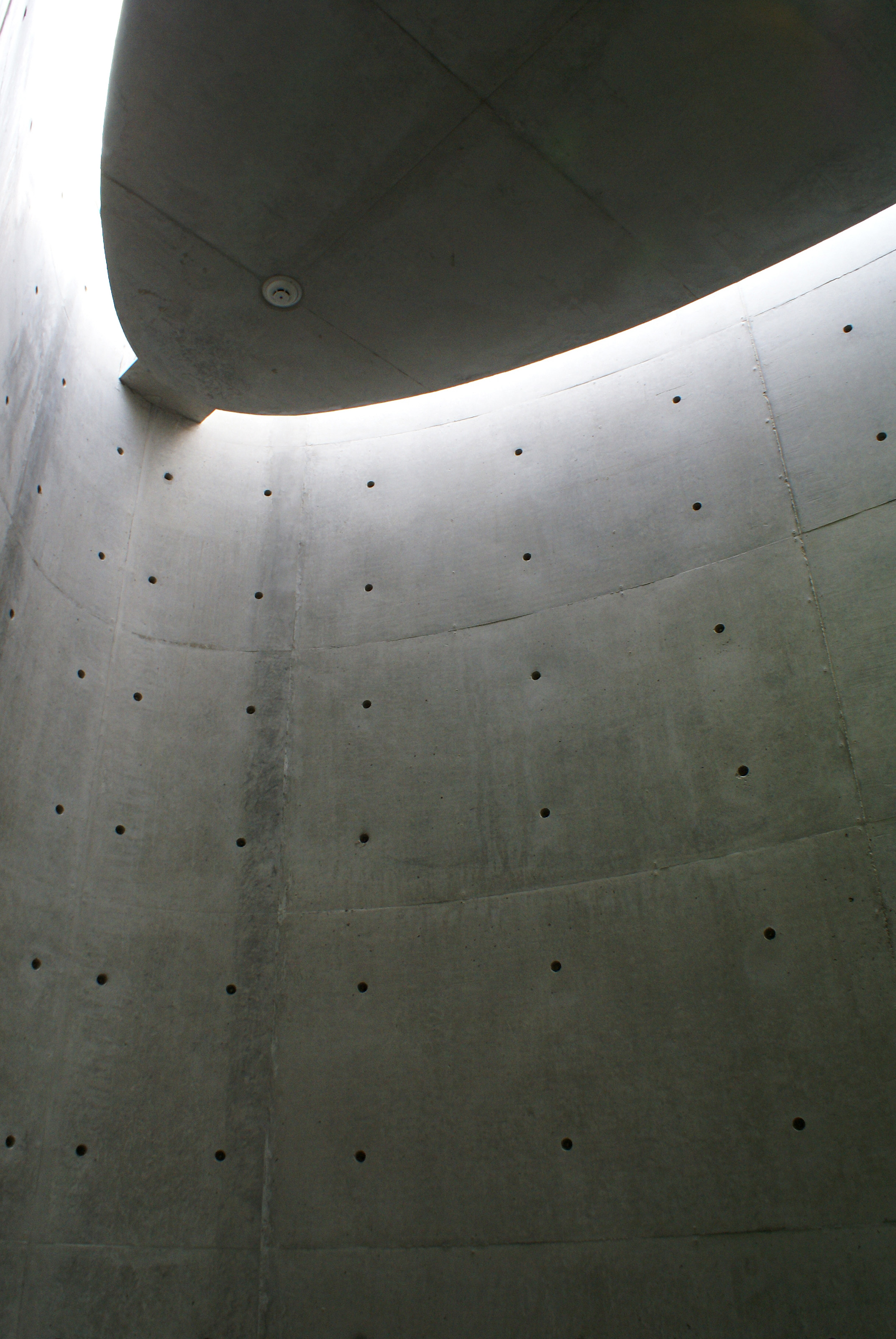 Shikokumura Gallery in Shikokumura, Takamatsu, Kagawa Prefecture, Japan